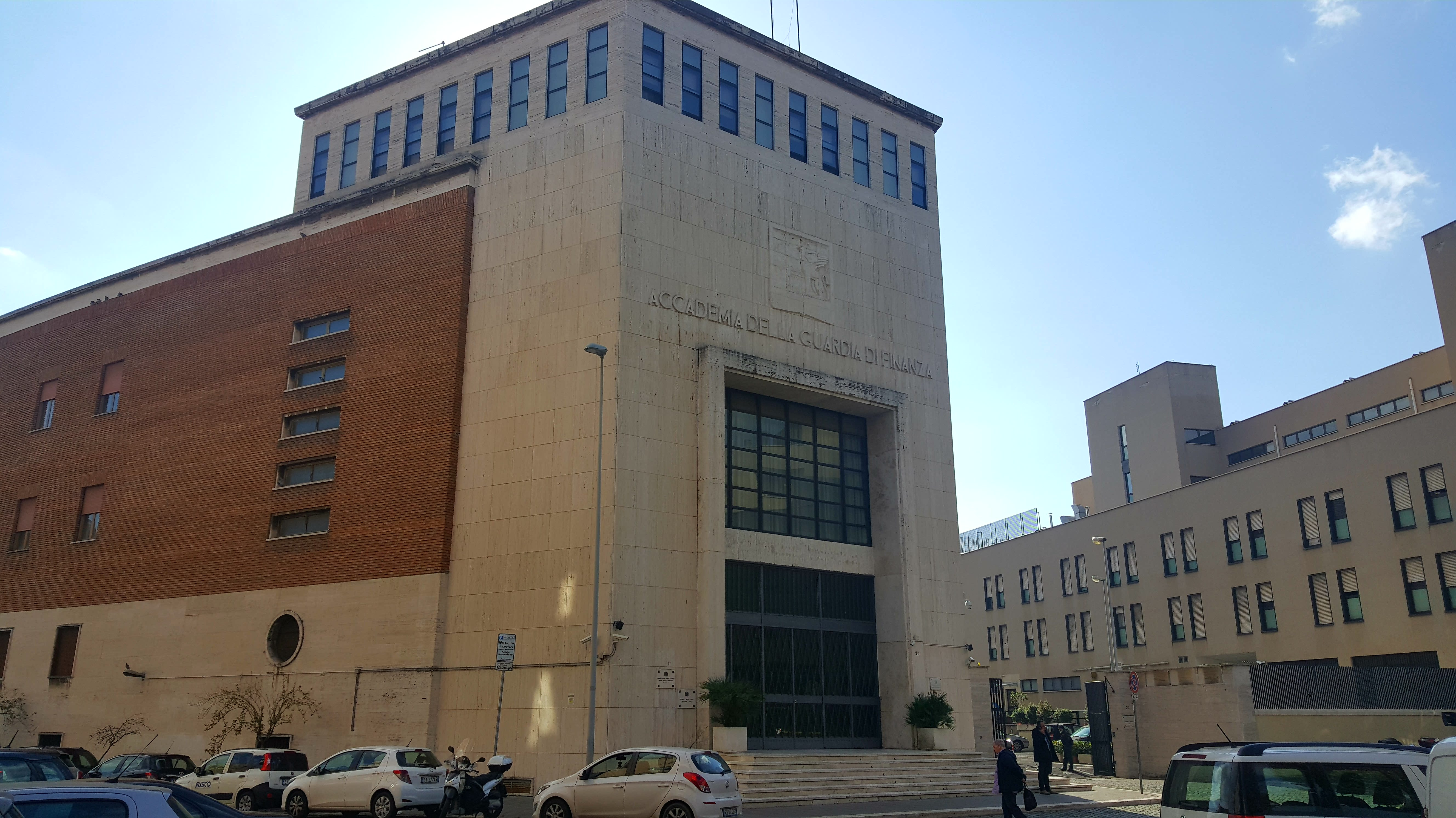 Vecchia sede dell'Accademia della Guardia di Finanza, a Roma, ora sede del Comando Generale e del Museo Sorico della Guardia di Finanza.